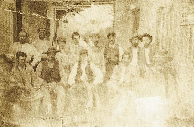 Los hermanos Zuloaga con los trabajadores de la Real Fábrica de la Moncloa (Madrid) hacia 1883. Museo Zuloaga (Segovia)